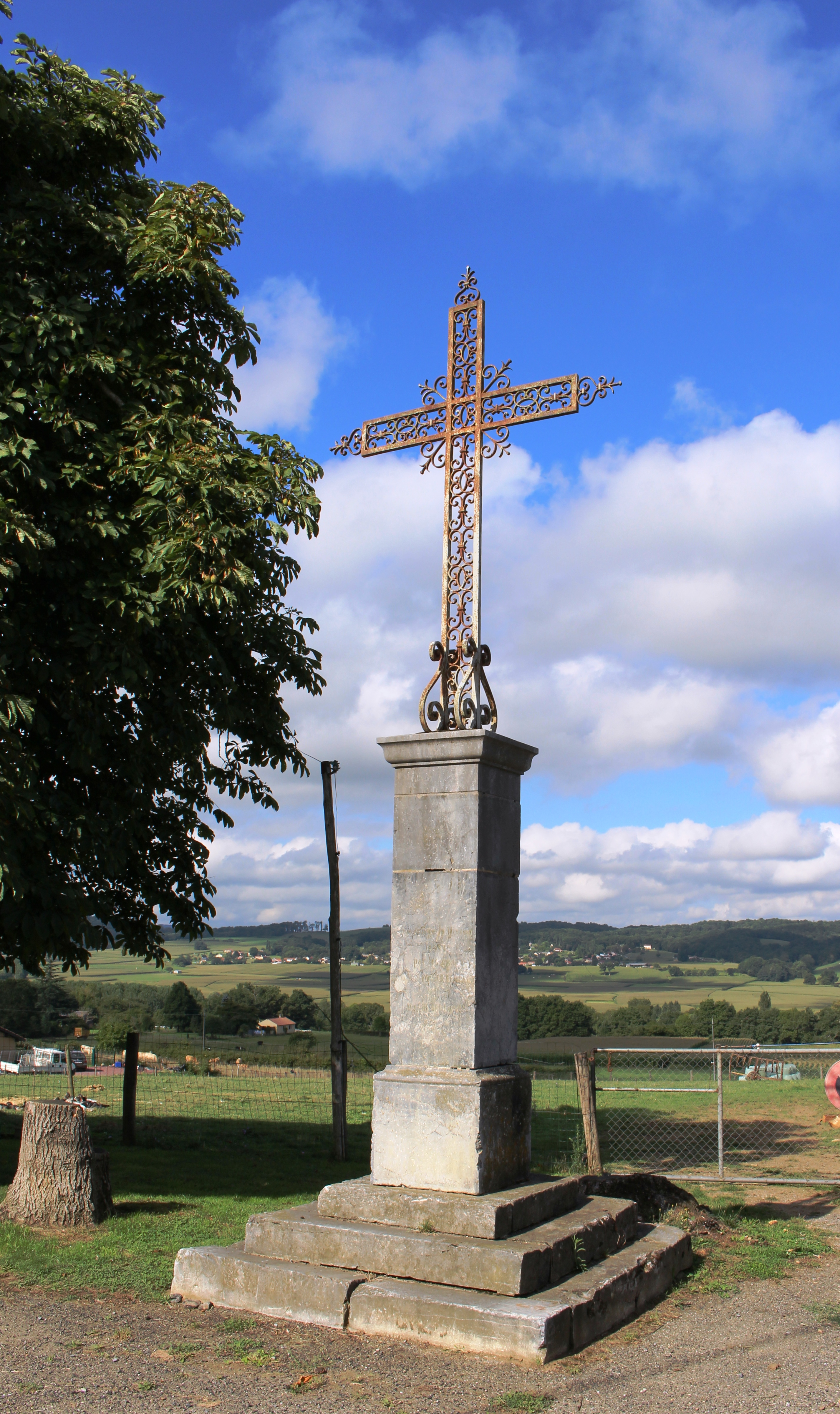 Croix de Clarac (Hautes-Pyrénées)